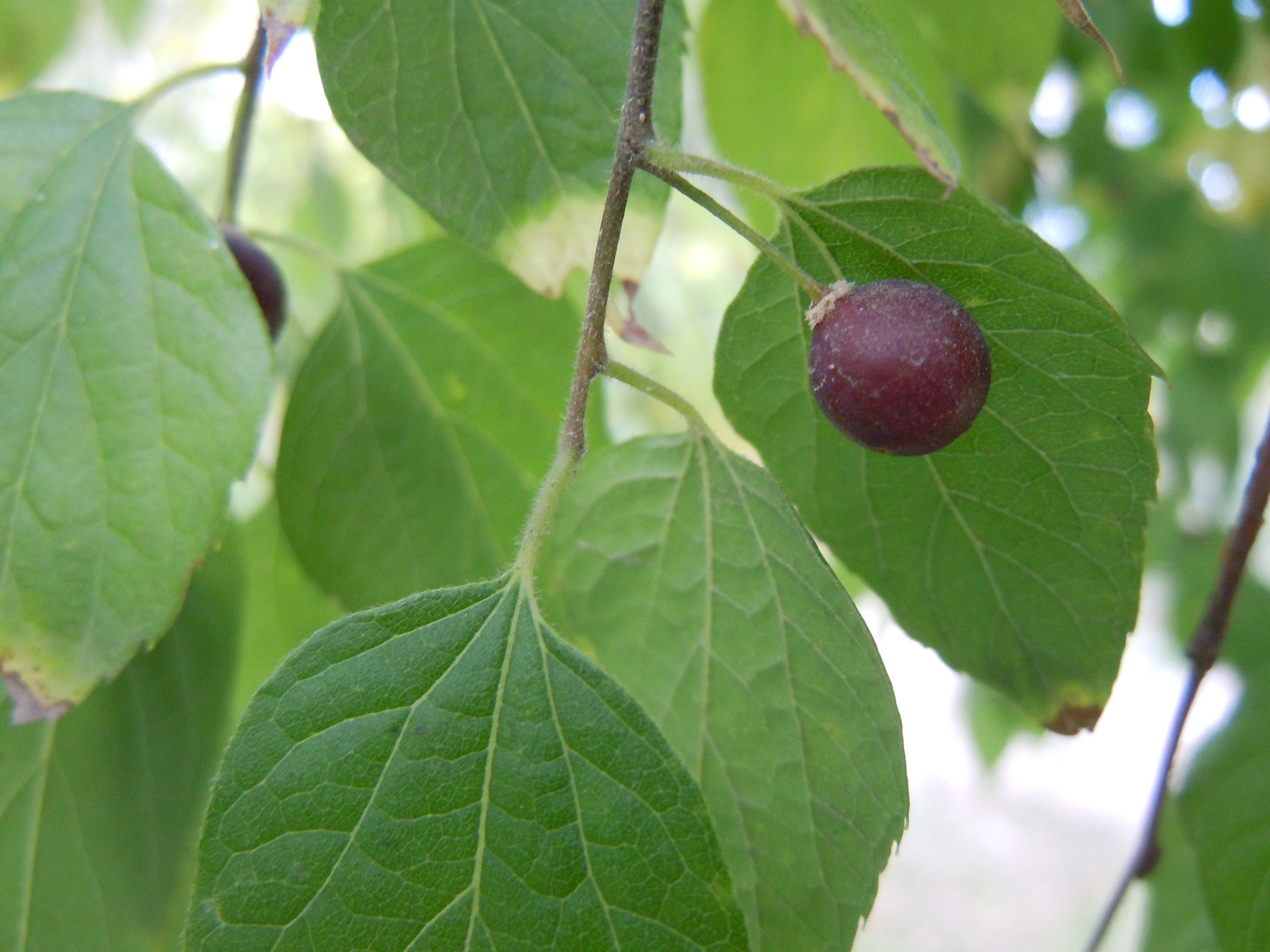 Ягоди каркаса західного Celtis occidentalis в Одесі, Гідропарк Лузанівка